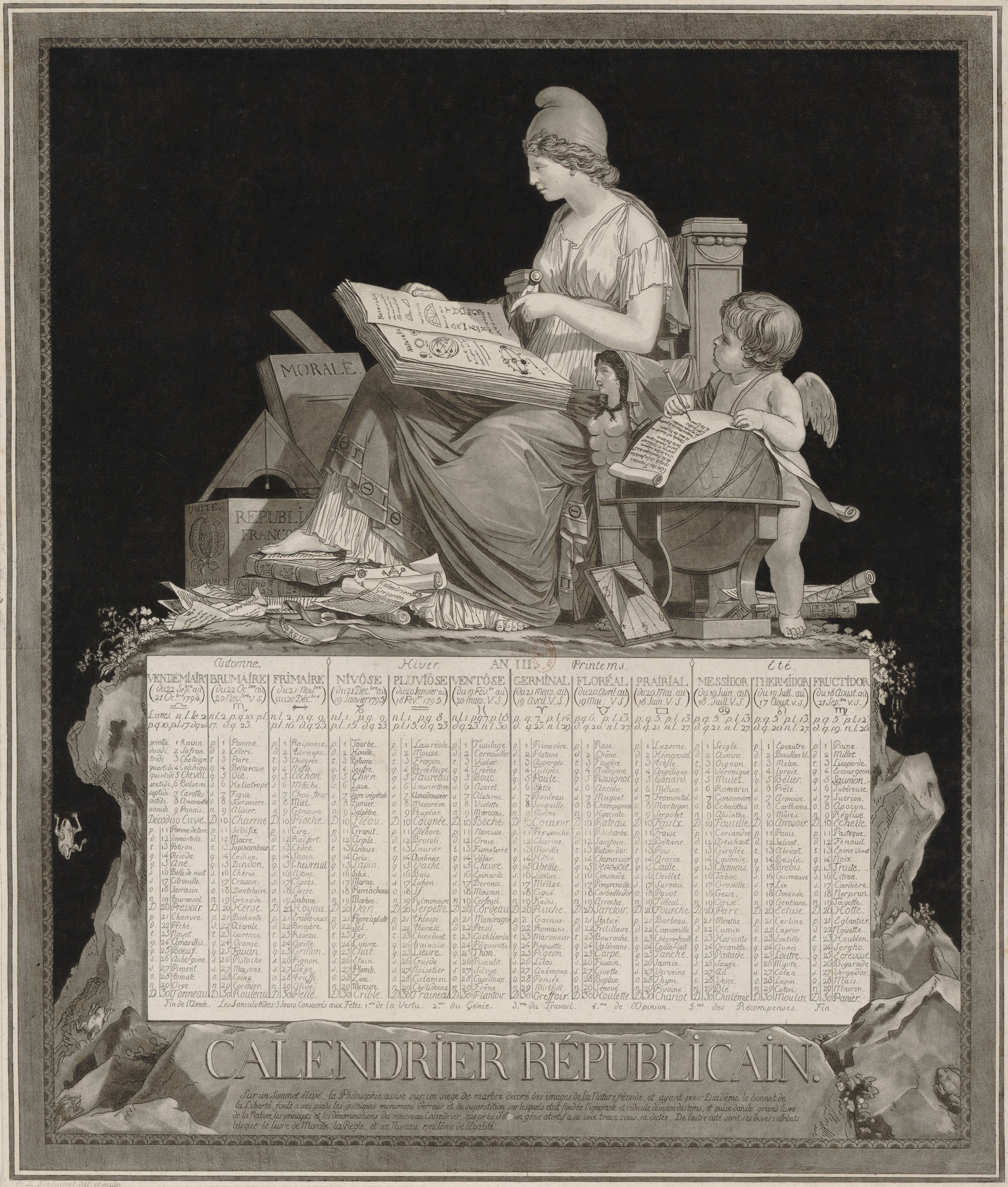 Calendrier républicain... : an III : [estampe] / P.L. Debucourt del. et sculp.